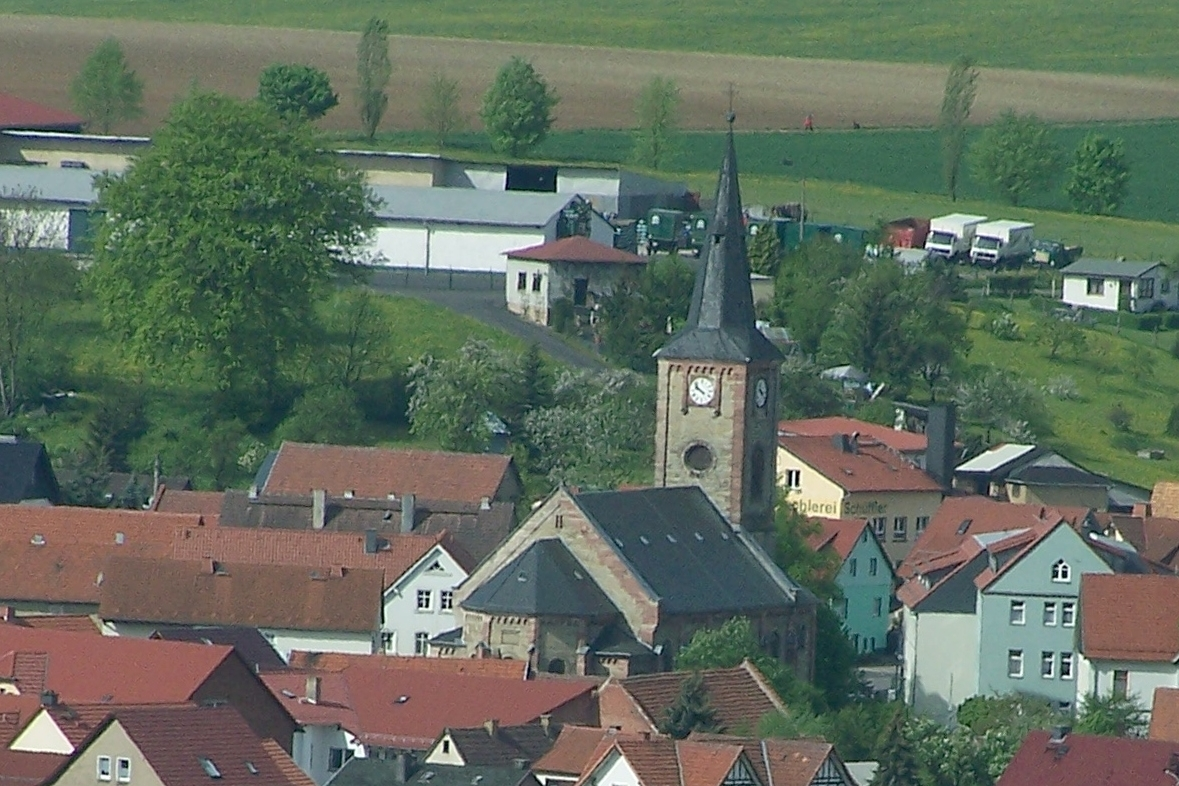 Blick von Nordosten in das Stadtzentrum von Kaltennordherim, Bereich der St.-Nikolai-Kirche